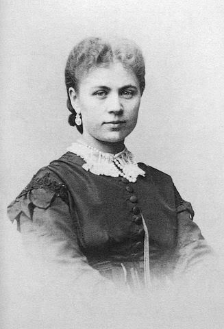 Надежда Сергеевна Акинфова, графиня Богарне, ур. Анненкова (1840—1891)